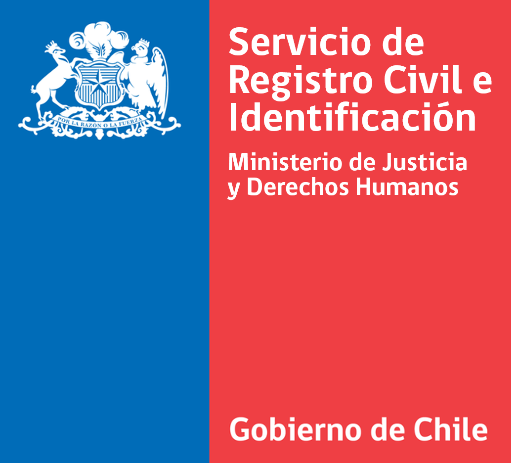 Logo Institucional del Servicio de Registro Civil e Identificación.